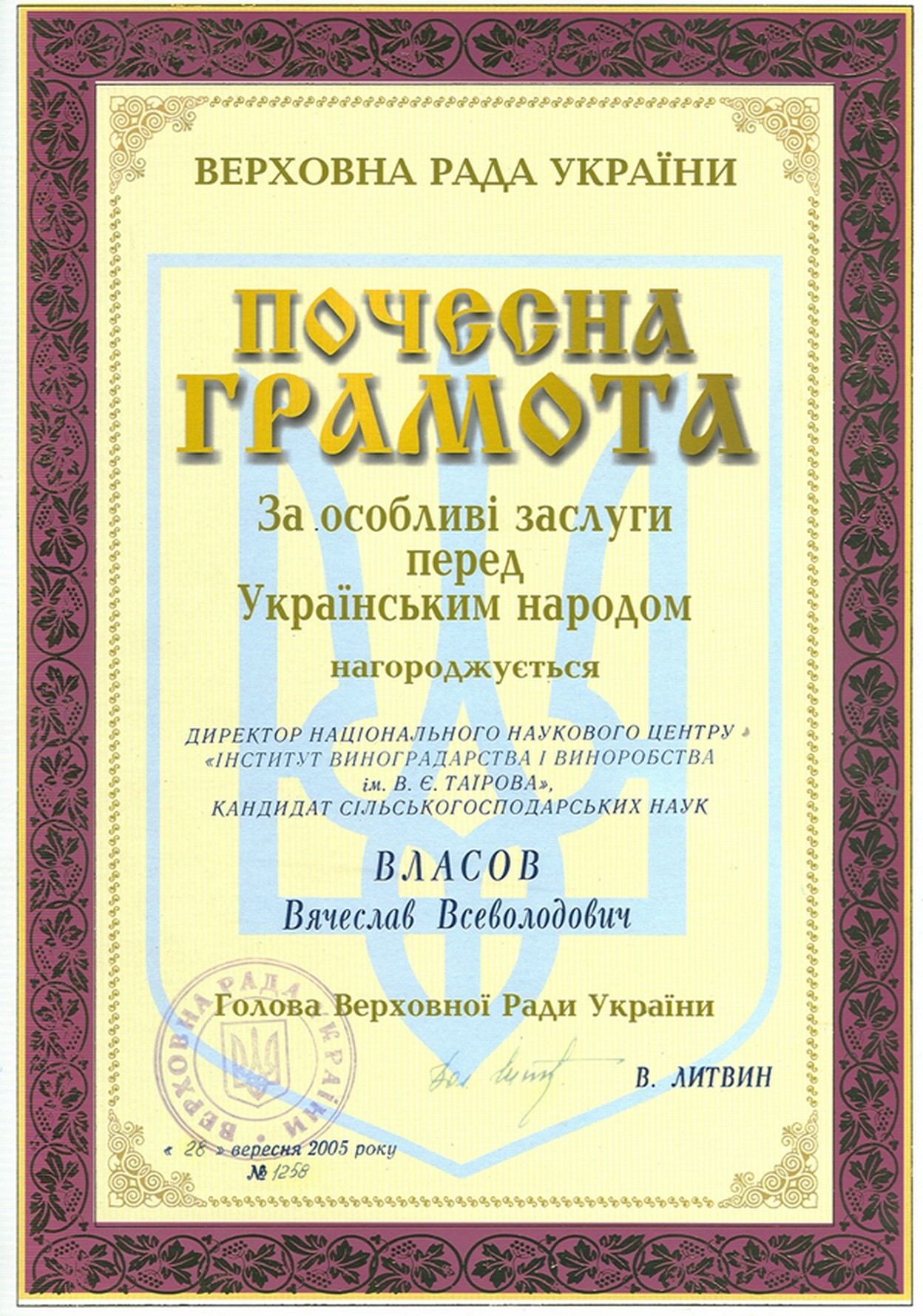 Почётная грамота Верховной Рады Украины Власову Вячеславу